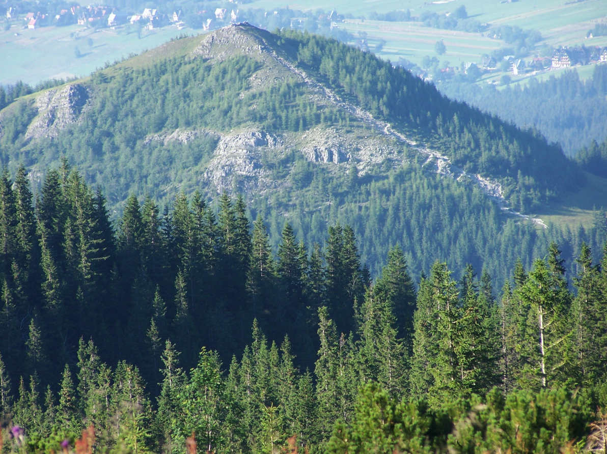 Kopieniec (Tatra Mountains)